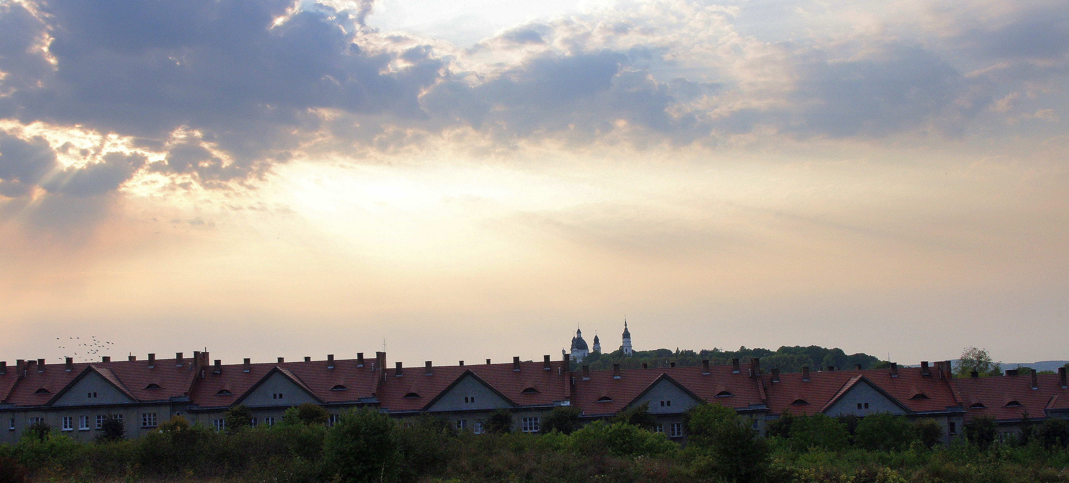 Prawie 200 budynków na 20 ulicach.Osiedle pracowników dyrekcji kolei państwowych.